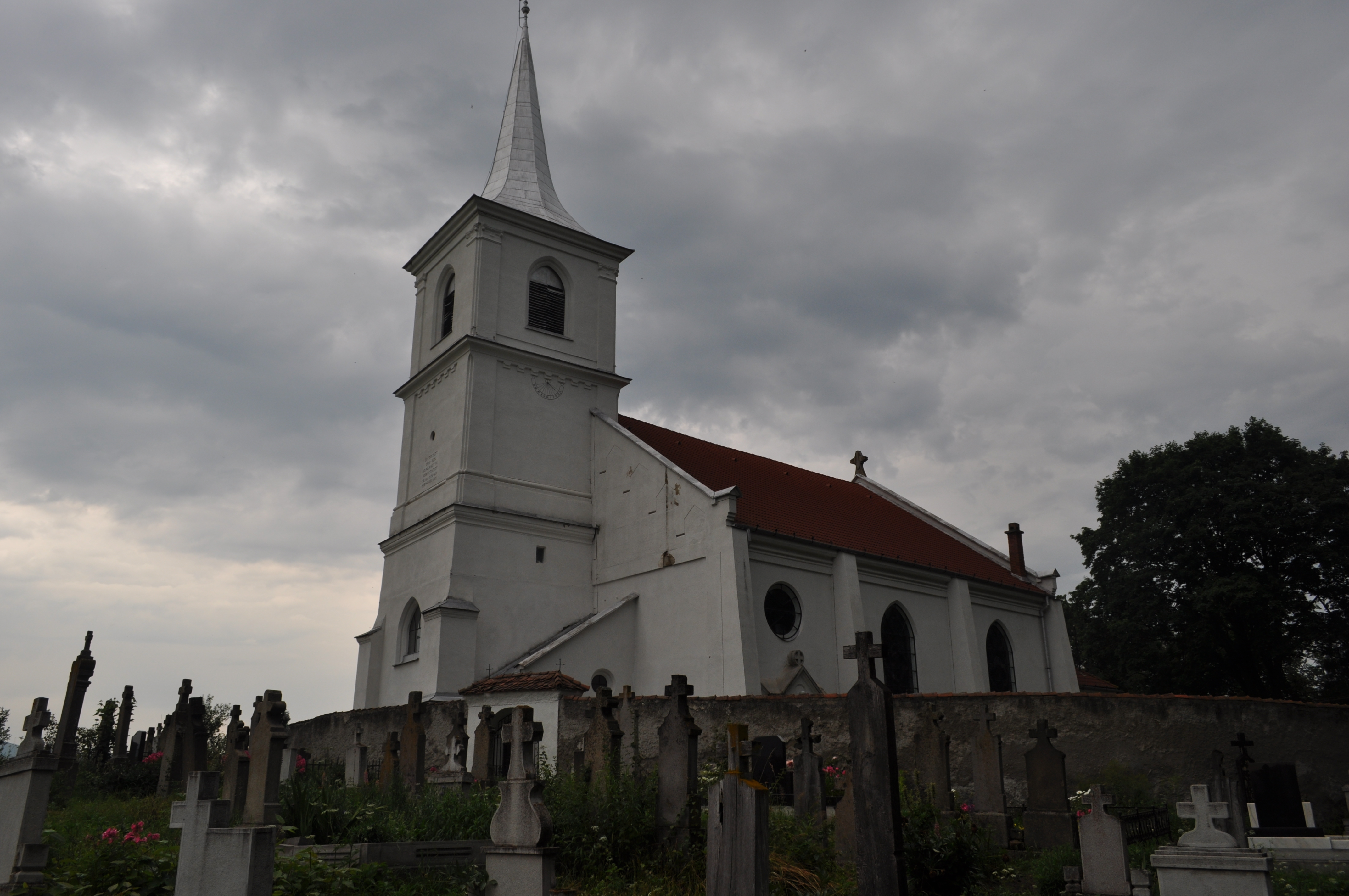 Plăieșii de Jos, județul Harghita